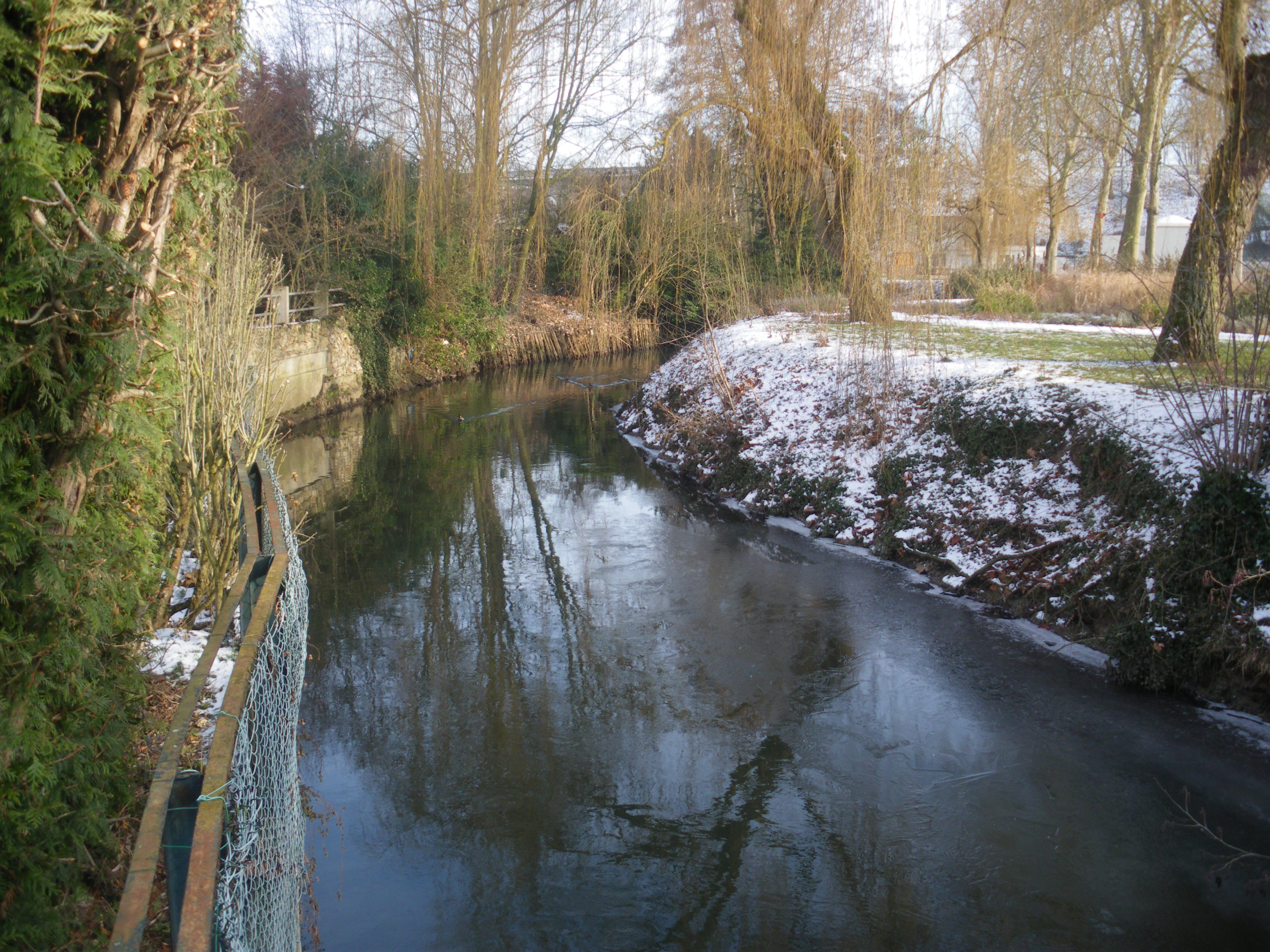 Rivière l'Yvette, à Orsay